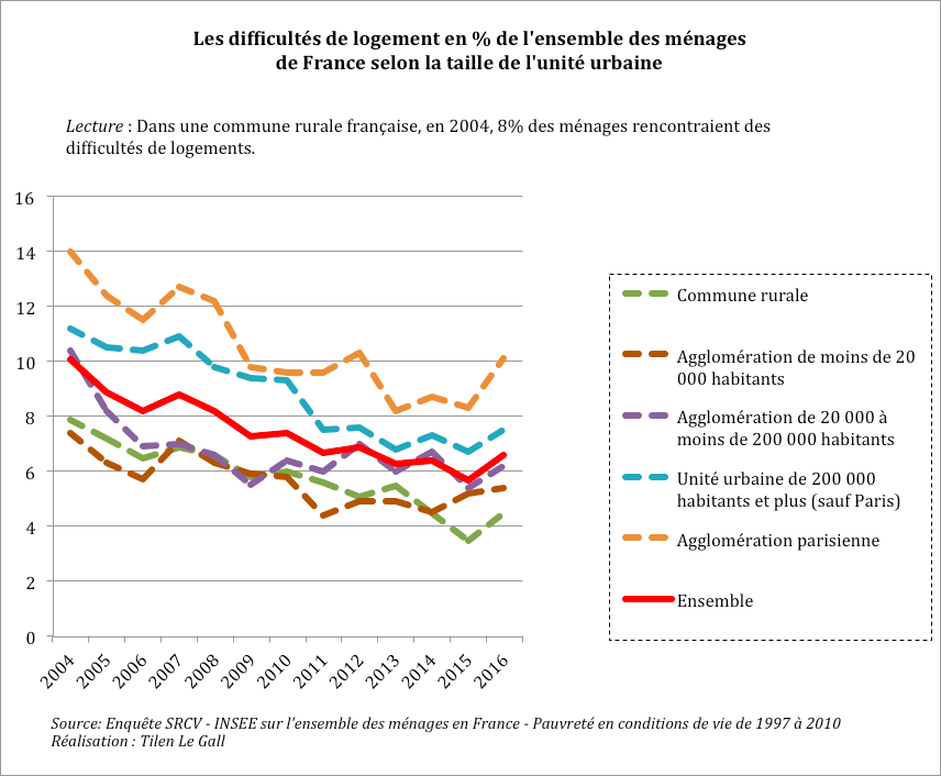 Lecture : Dans une commune rurale française, en 2004, 8% des ménages rencontraient des difficultés de logement.